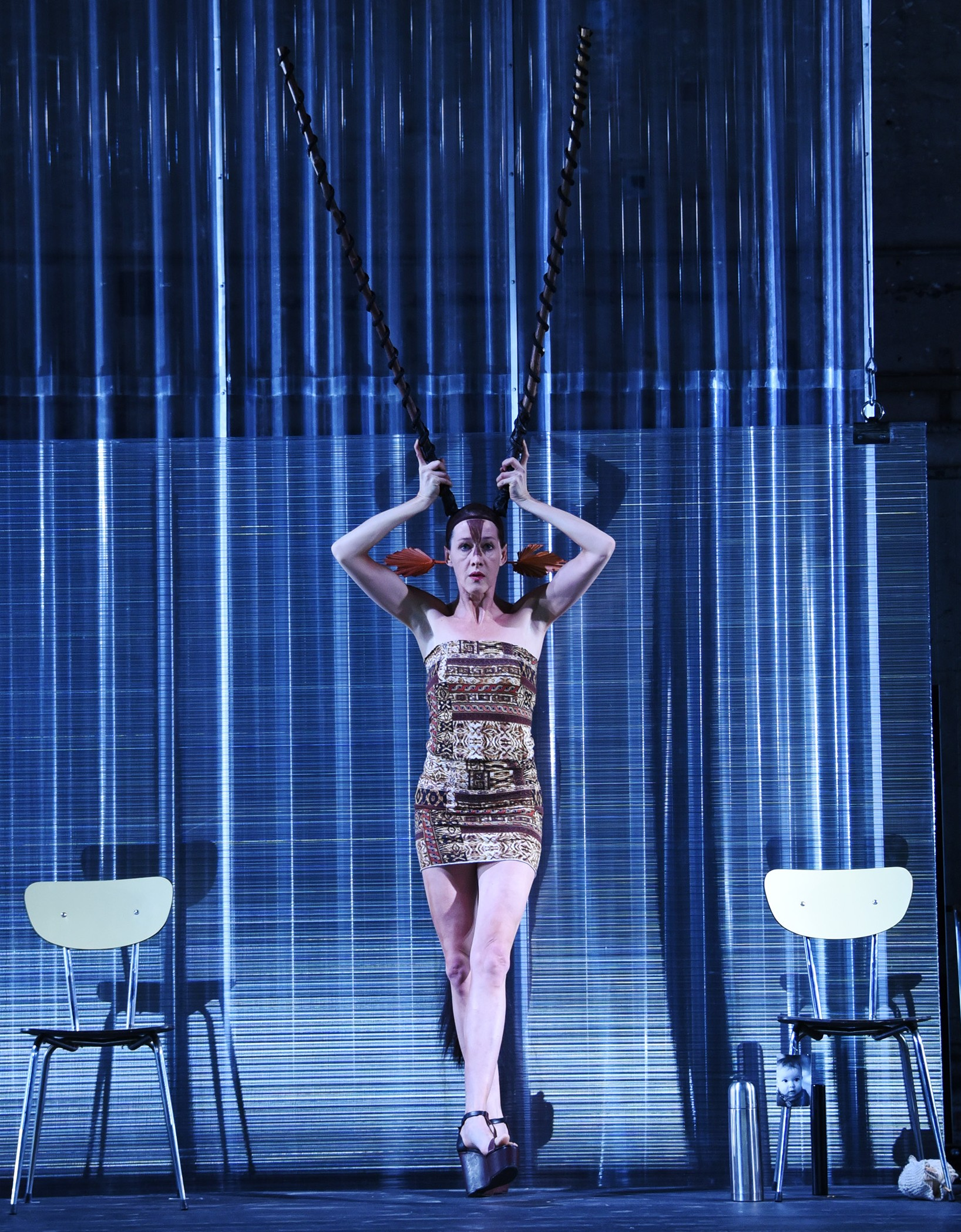 Theaterstück Das Reich der Tiere. Akademietheater Wien